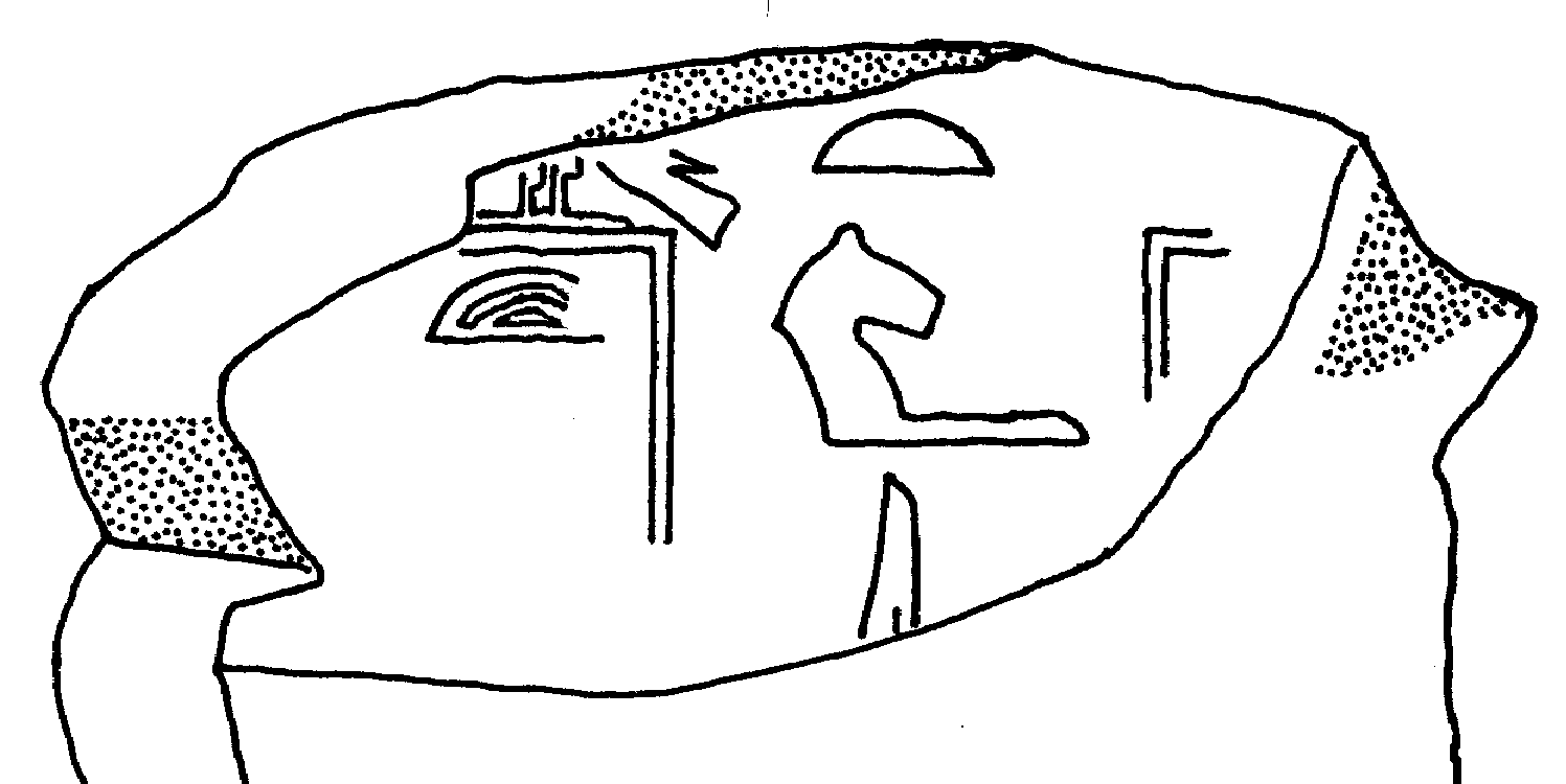 Tonsiegelfragment des Königs Chaba (3. Dynastie) aus Elephantine